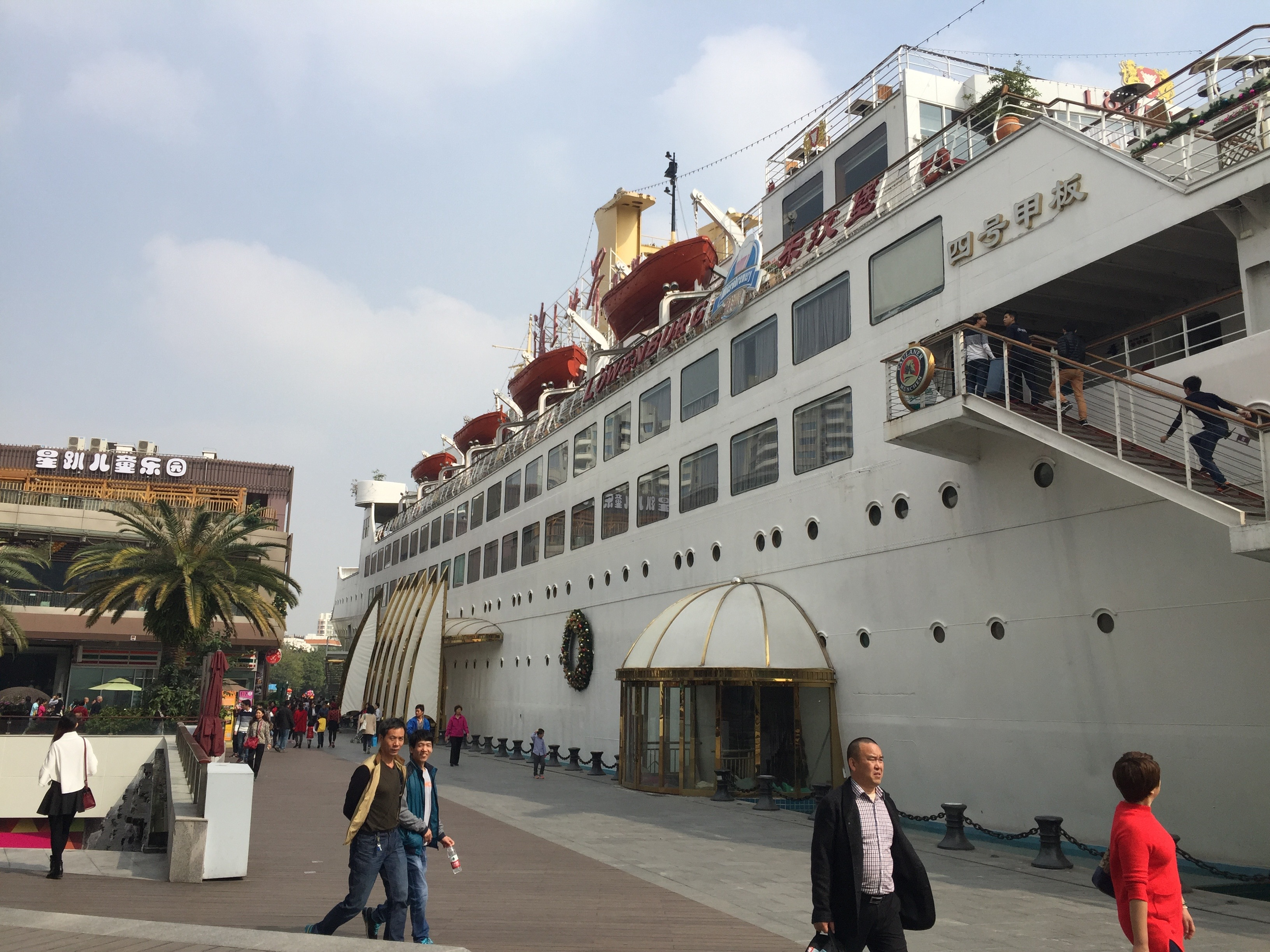 中文（中国大陆）: 深圳海上世界的船